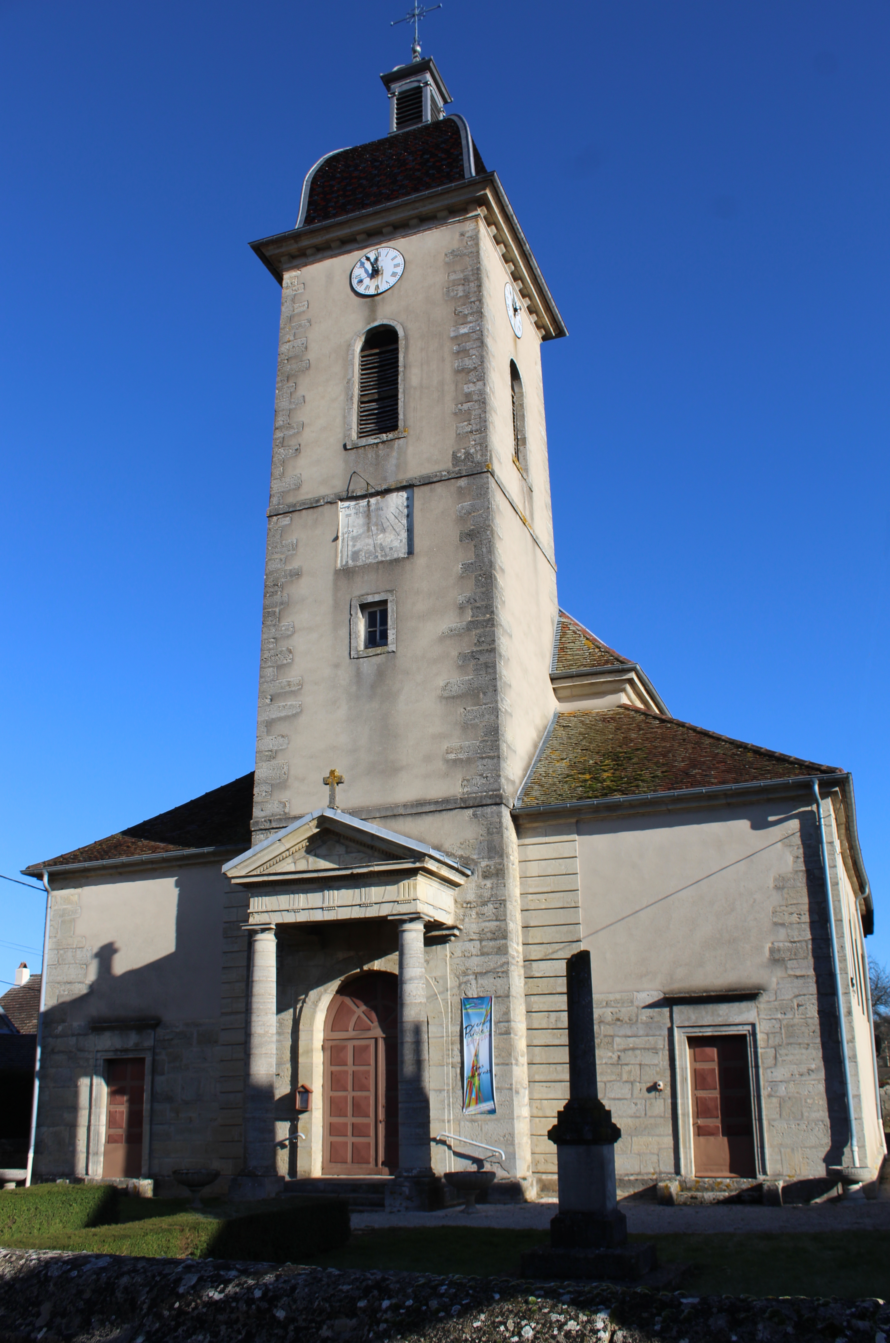 L'église